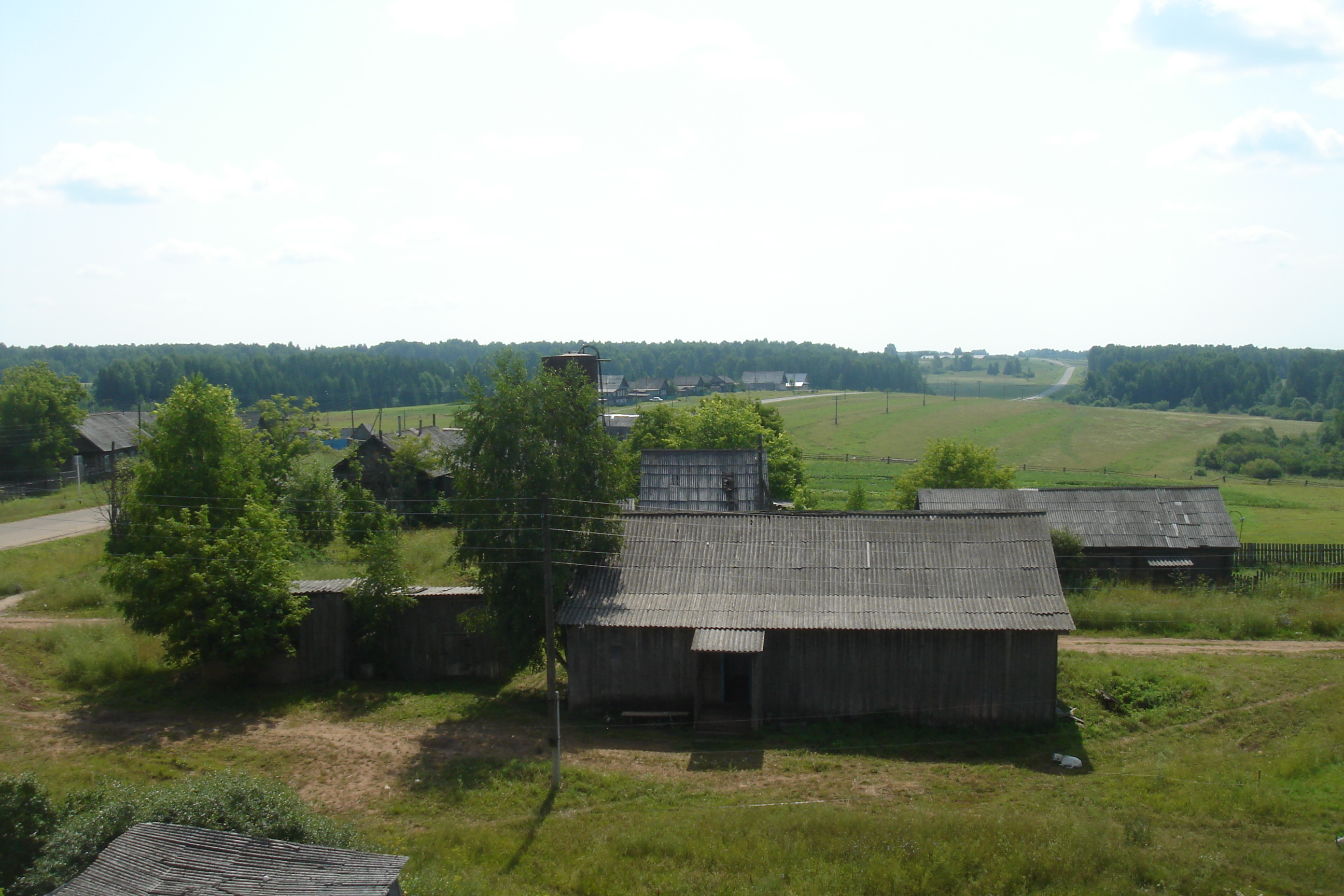 Вид на село с церкви. Село Валамаз Селтинского района Удмуртии.